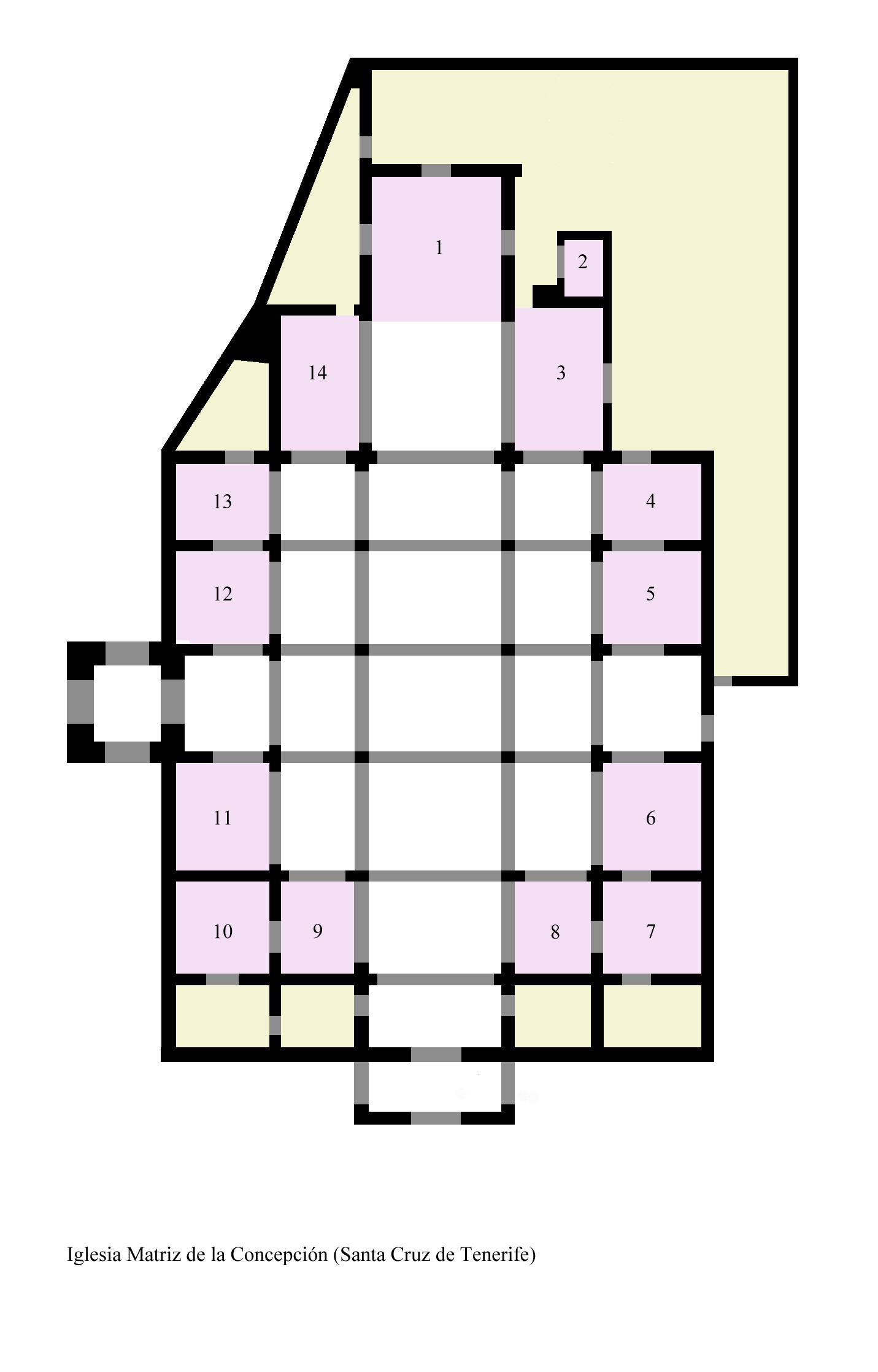 Planta de la Iglesia Matriz de la Concepción (Santa Cruz de Tenerife)